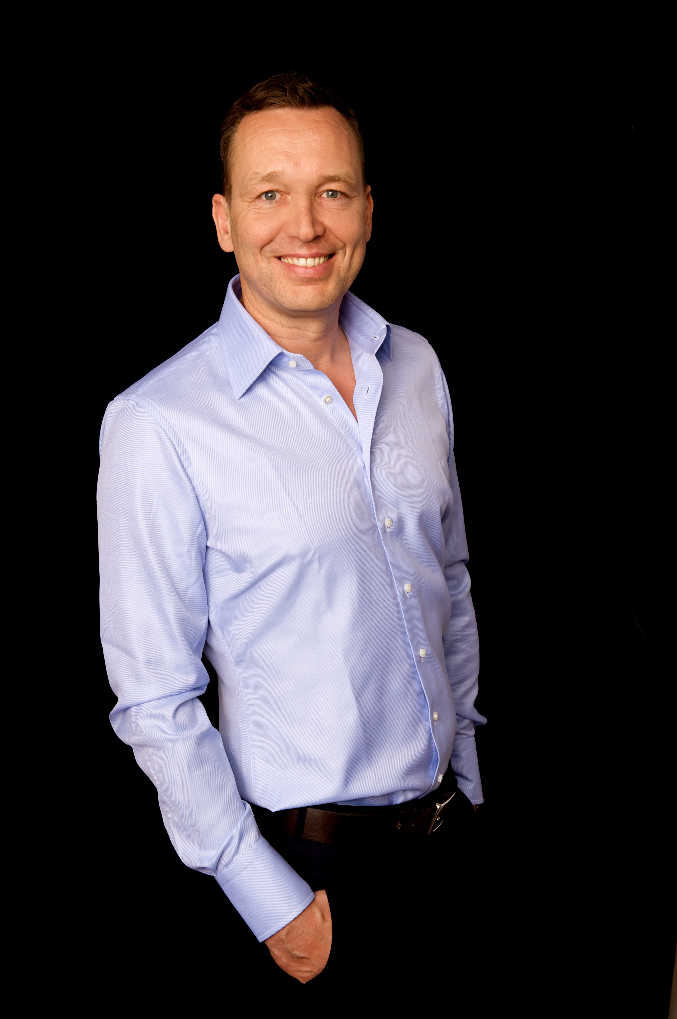 Oliver Radtke Oberkörper